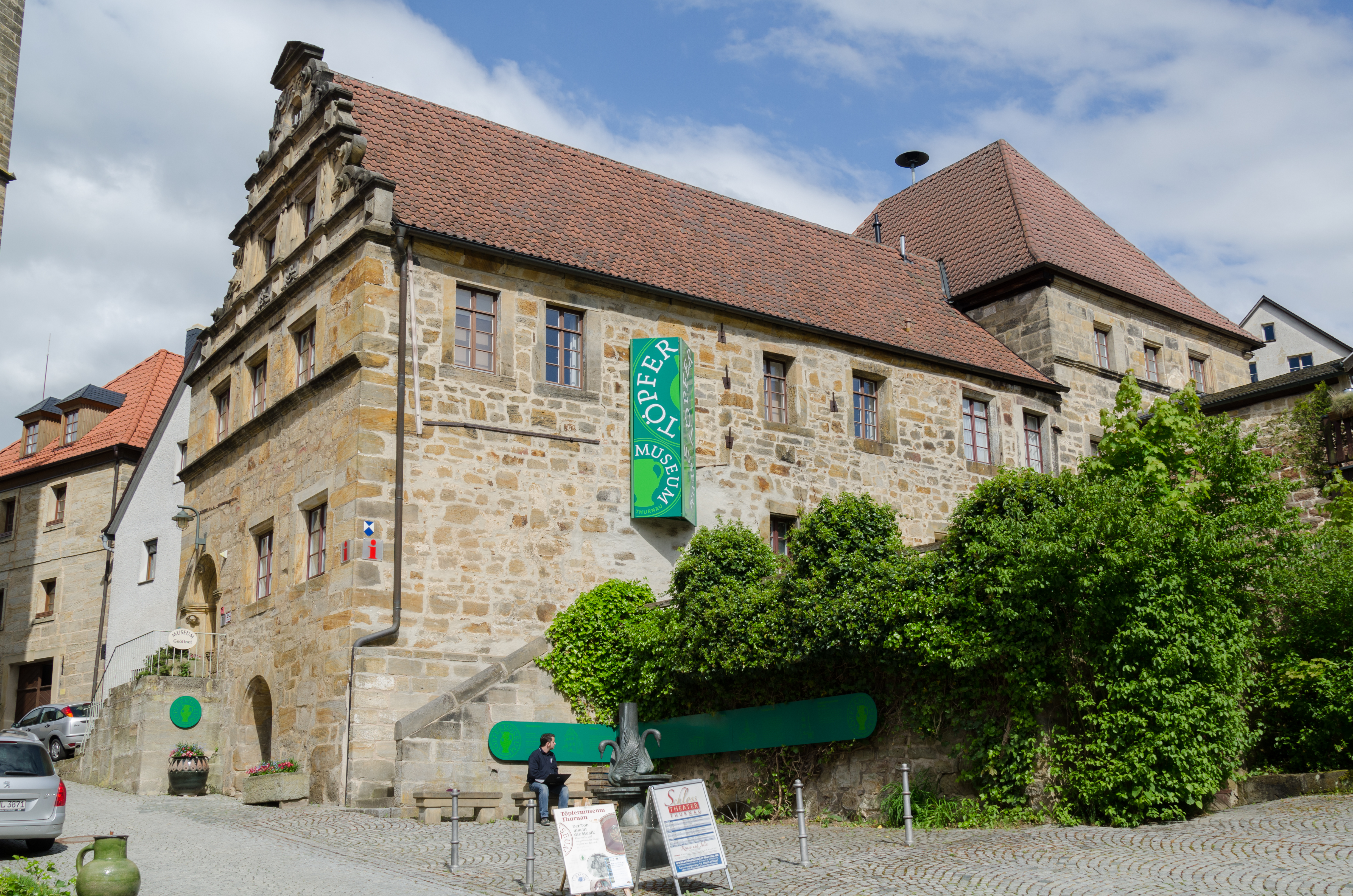 Thurnau, Kirchplatz 12, Töpfermuseum (früher Lateinschule)